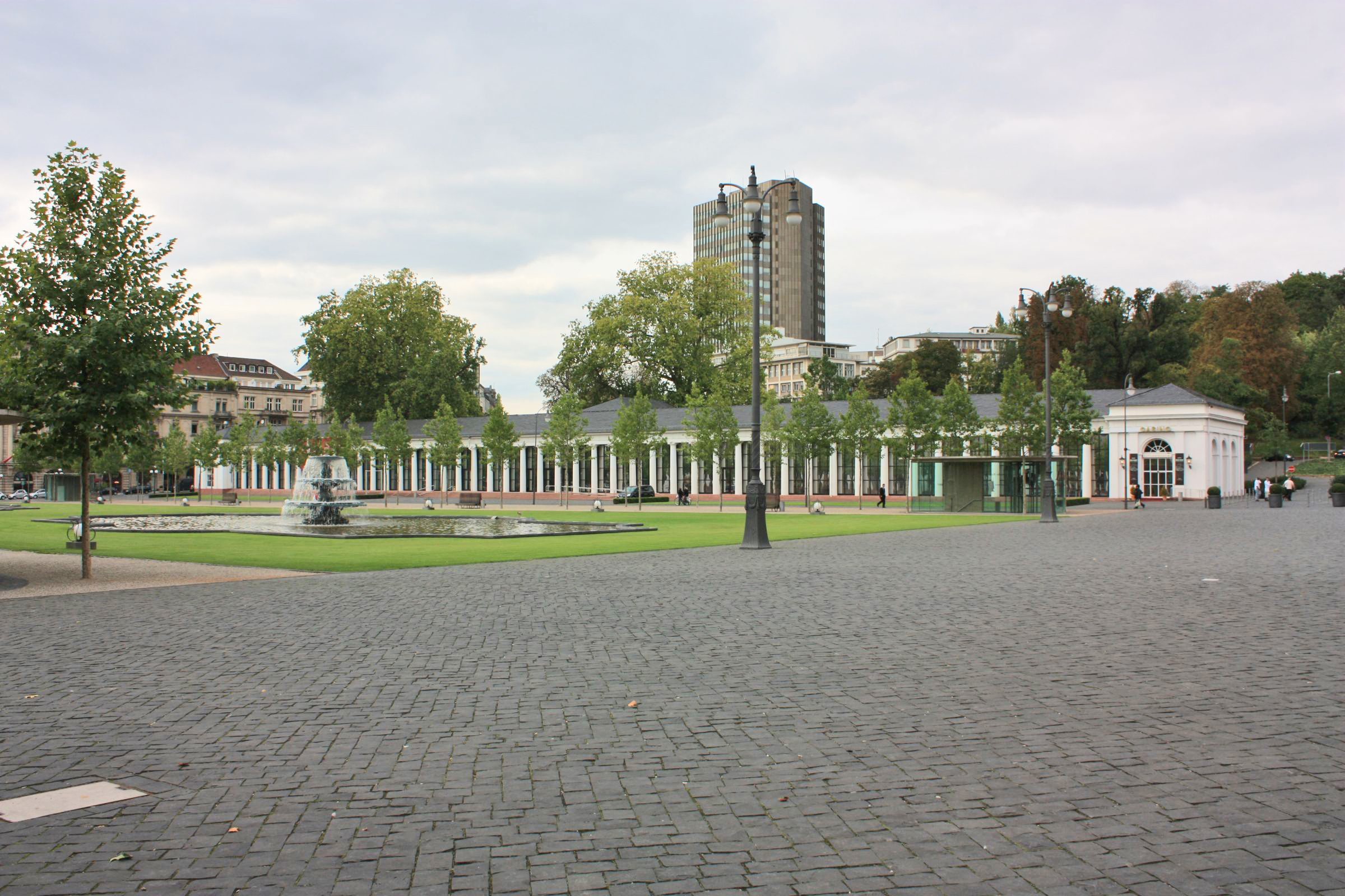 Kurhauskolonnade am Bowling Green in Wiesbaden, Hessen. Das Gebäude beherbergt das kleine Spiel der Spielbank Wiesbaden. Erbaut von H. J. Zengerle 1827, mehrfach umgebaut.